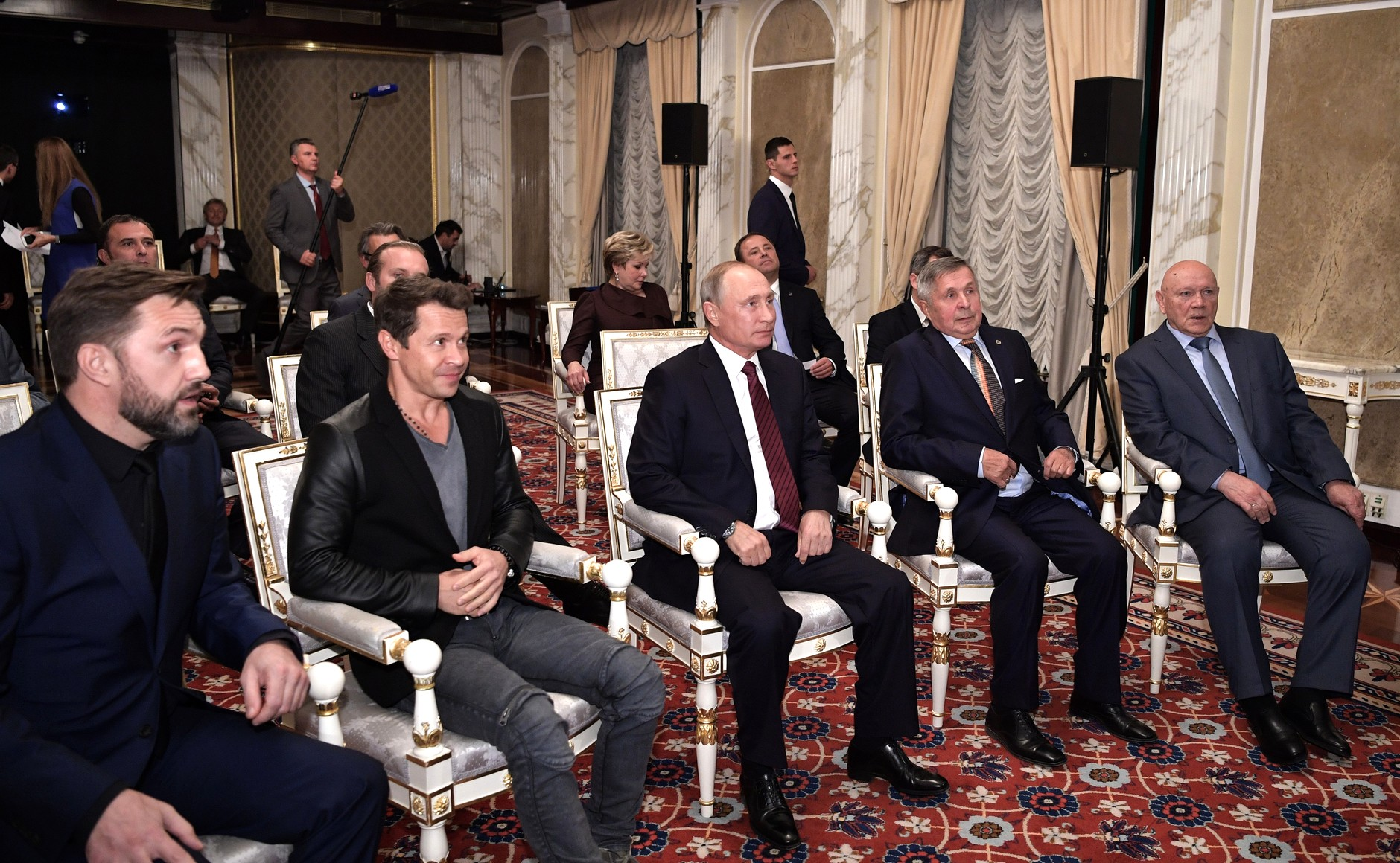 Встреча Президента России Владимира Путина со съёмочной группой фильма «Салют-7». Перед началом просмотра фильма